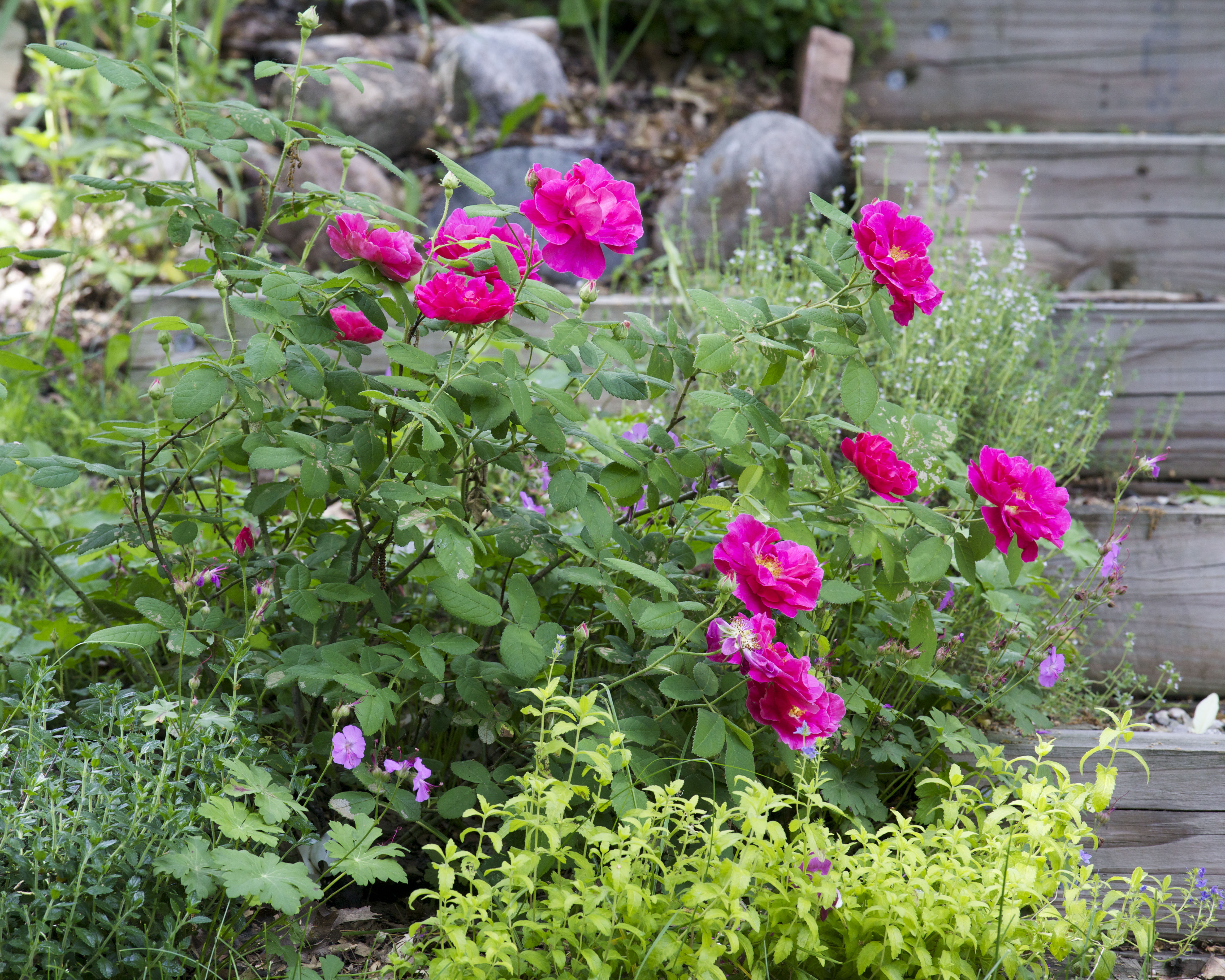 Was used in medieval herb gardens.